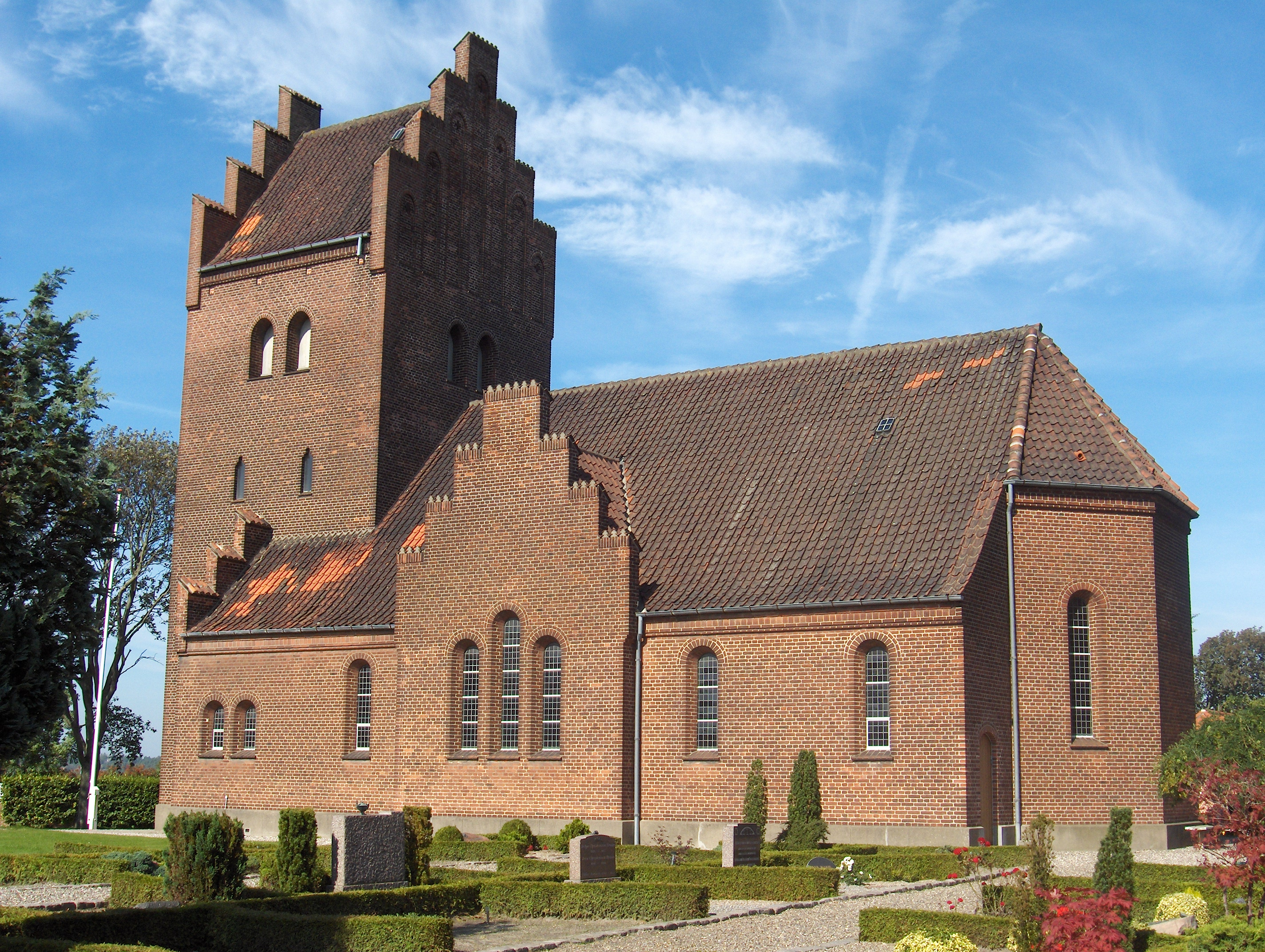 Rørdal Kirke ved Aalborg